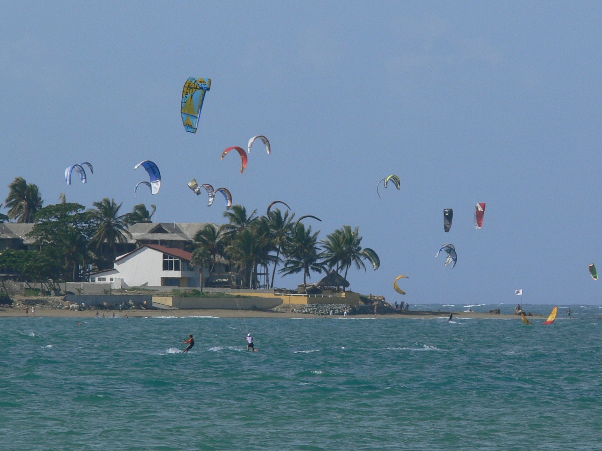 Kitesurfer am Strand von Cabarete